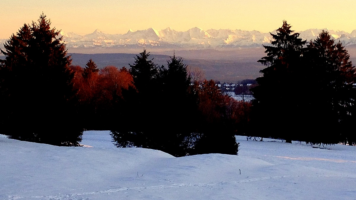 Plateau de Diesse vu depuis les contreforts du Mont Sujet au dessus de Diesse et en direction de Prêles, dont on aperçoit des maisons. Au fond les Alpes bernoises.